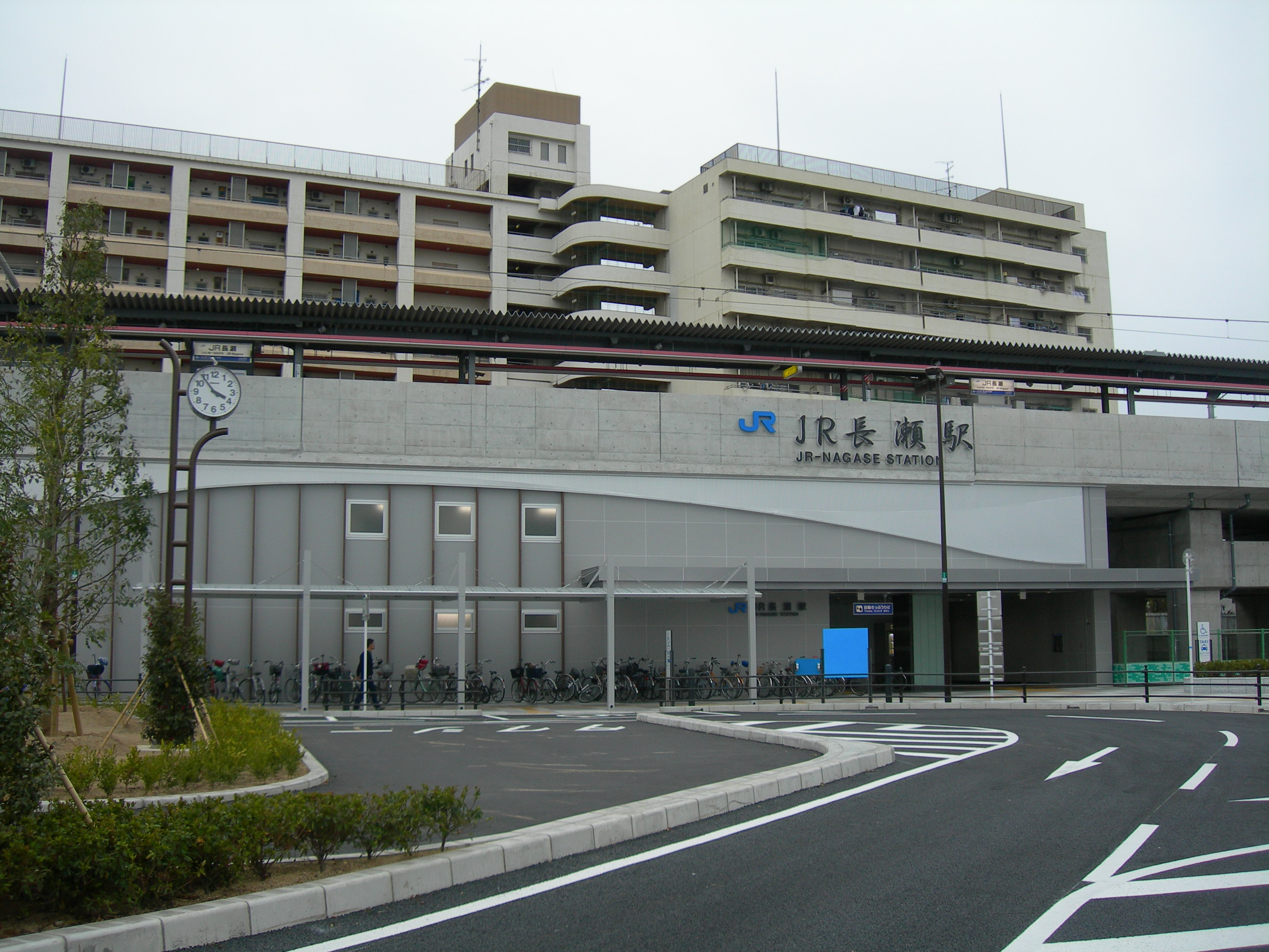 JR長瀬駅